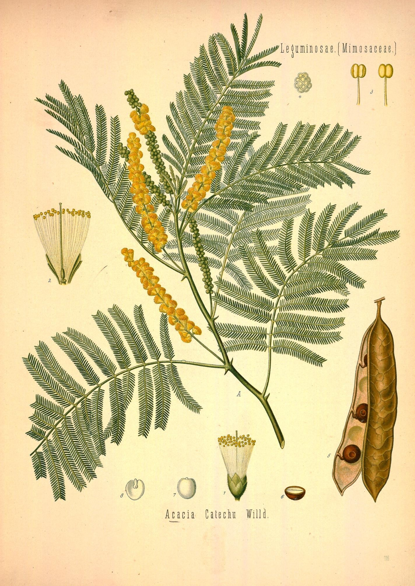 Catechu-Acacie. A blühender Zweig, nat. Grösse; 1 Blüthe, vergrössert; 2 dieselbe im Längsschnitt, desgl.; 3 Staubgefässe von verschiedenen Seiten, desgl.; 4 Pollenmasse, desgl.; 5 Frucht, nat. Grösse; 6 Same zerschnitten, desgl.; 7 und 8 Embryo von aussen und innen, desgl.